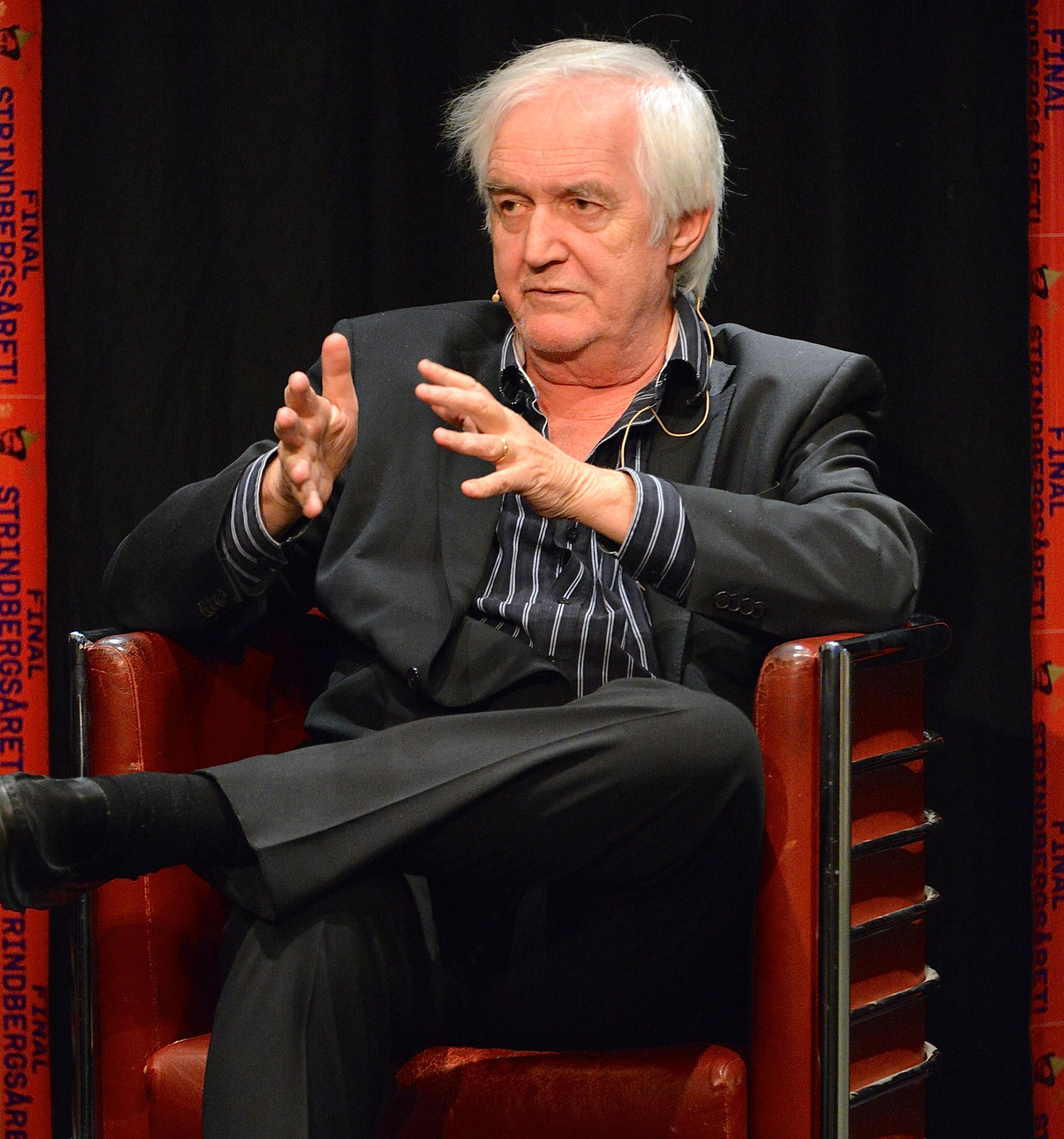 Henning Mankell i ett framträdande under Strindbergsårets sista dag, den 20 januari 2013 i Kulturhuset i Stockholm.